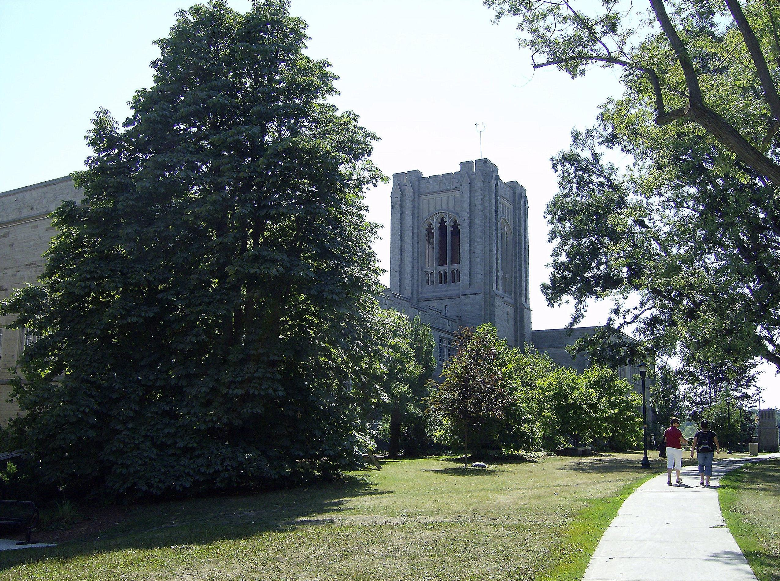 Western Engineering Bldg